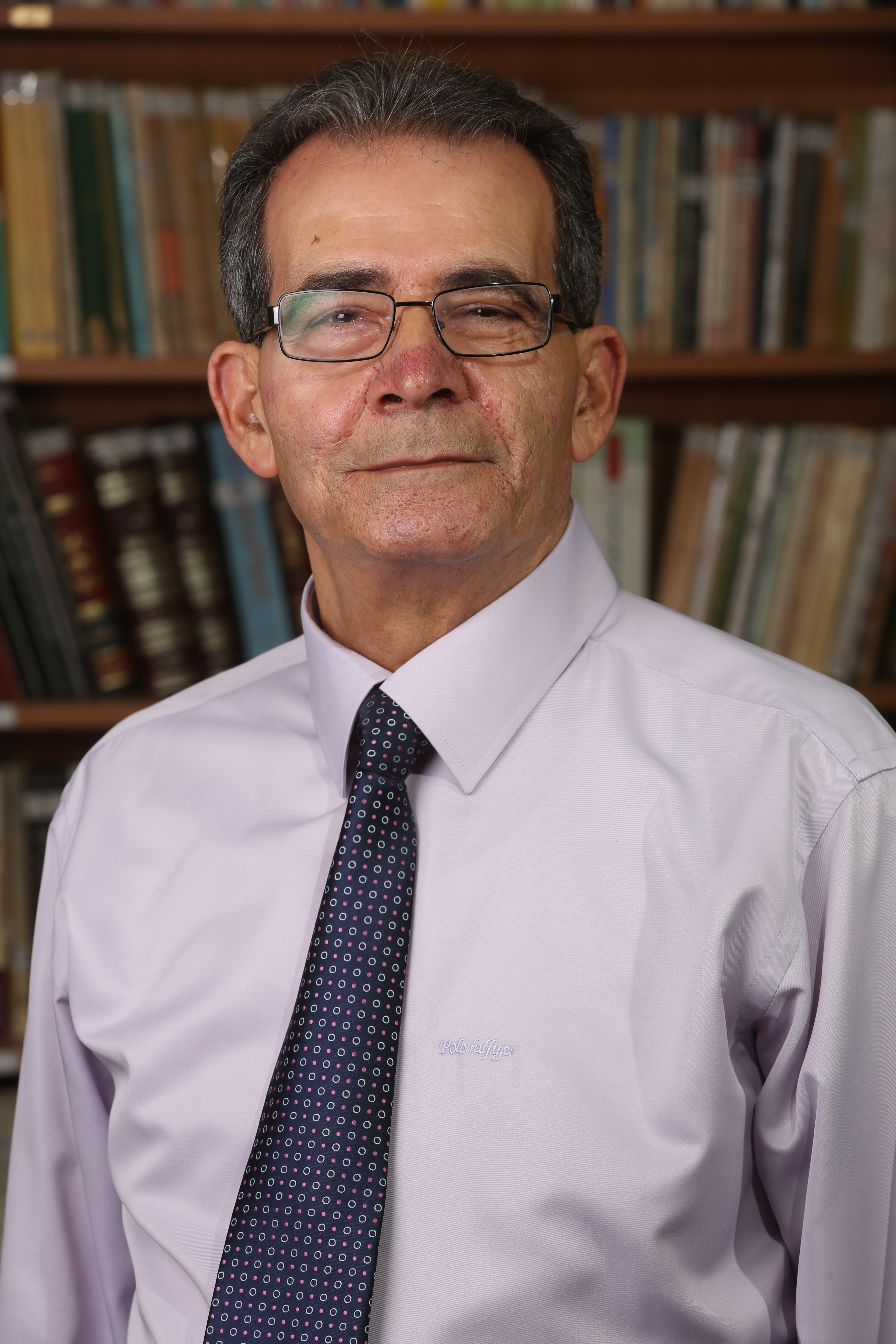 מחמוד גנאים